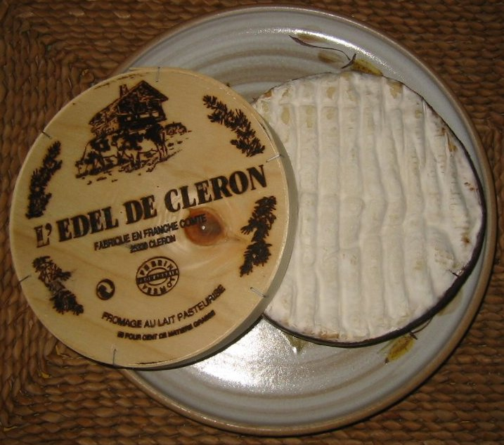 Edel de Cleron - Fromage de la gastronomie Franc Comtoise